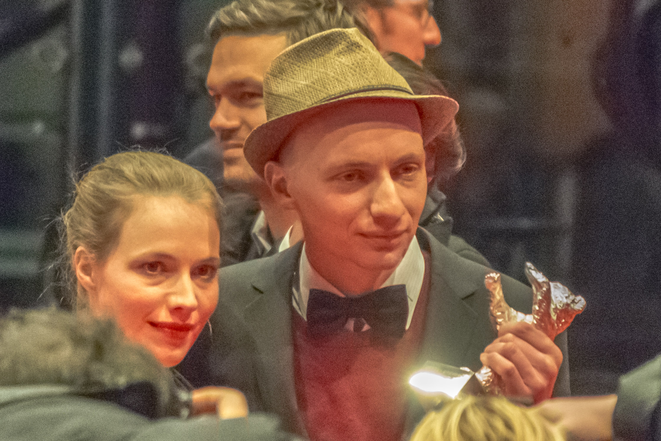 Anna und Dietrich Brüggemann mit Bär Berlinale 2014